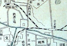 Railway Map between Daitotei(Dadacheng) and Taihoku(Taipei), Taihoku, Taiwan